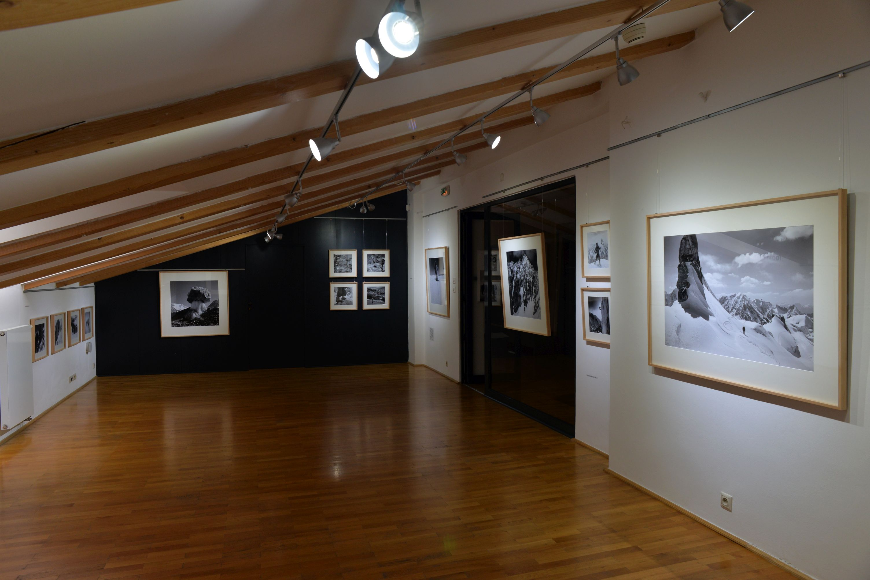 Fotografie z instalace výstavy fotografií Viléma Heckela (duben-červen 2019).